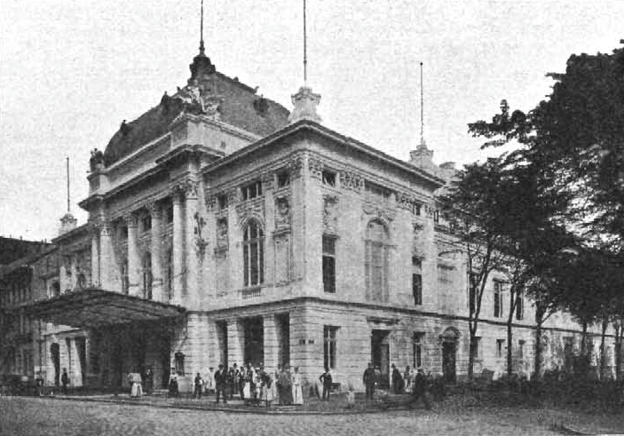 Deutsches Schauspielhaus, Neubau 1901, Ecke Kirchenallee / Ecke Capellenstraße (heute Ellmenreichstraße) This is the photograph of an architectural monument. It is part of the list of cultural monuments of Hamburg, no. 618